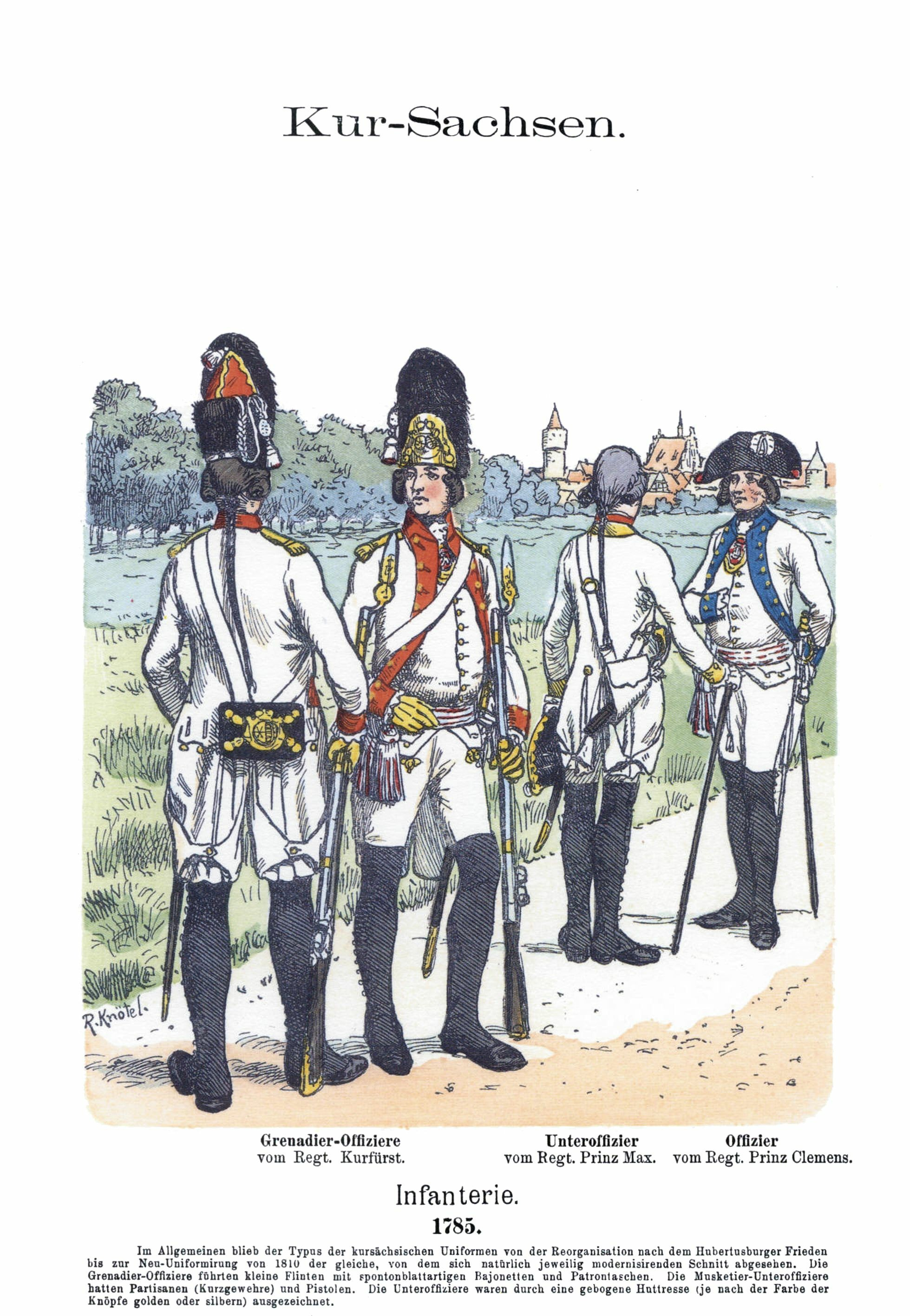 Sächsische Armee: Artillerie, Pioniere und Train: siehe Beschriftung auf Grafik